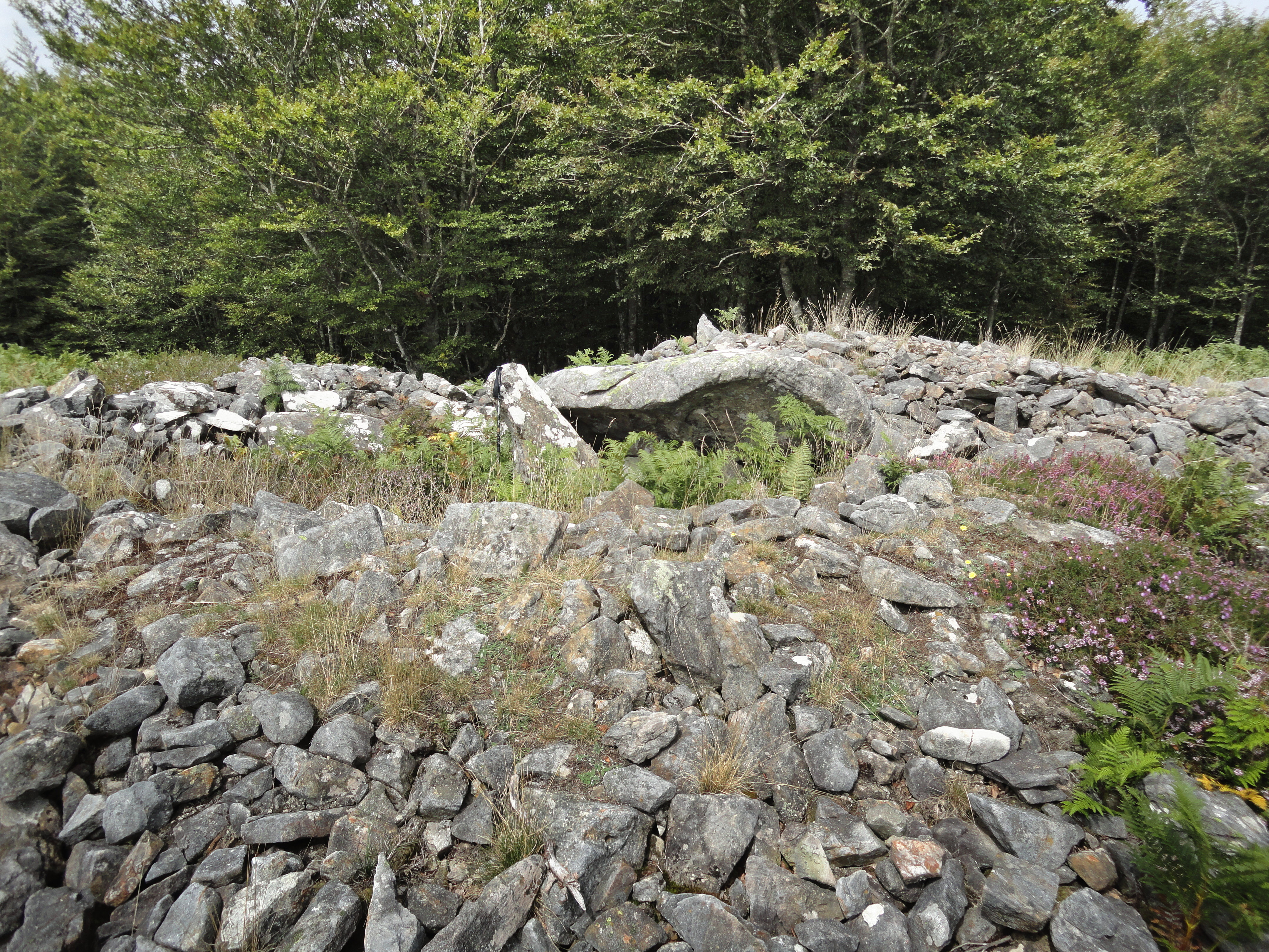 Arrobigaña trikuharria